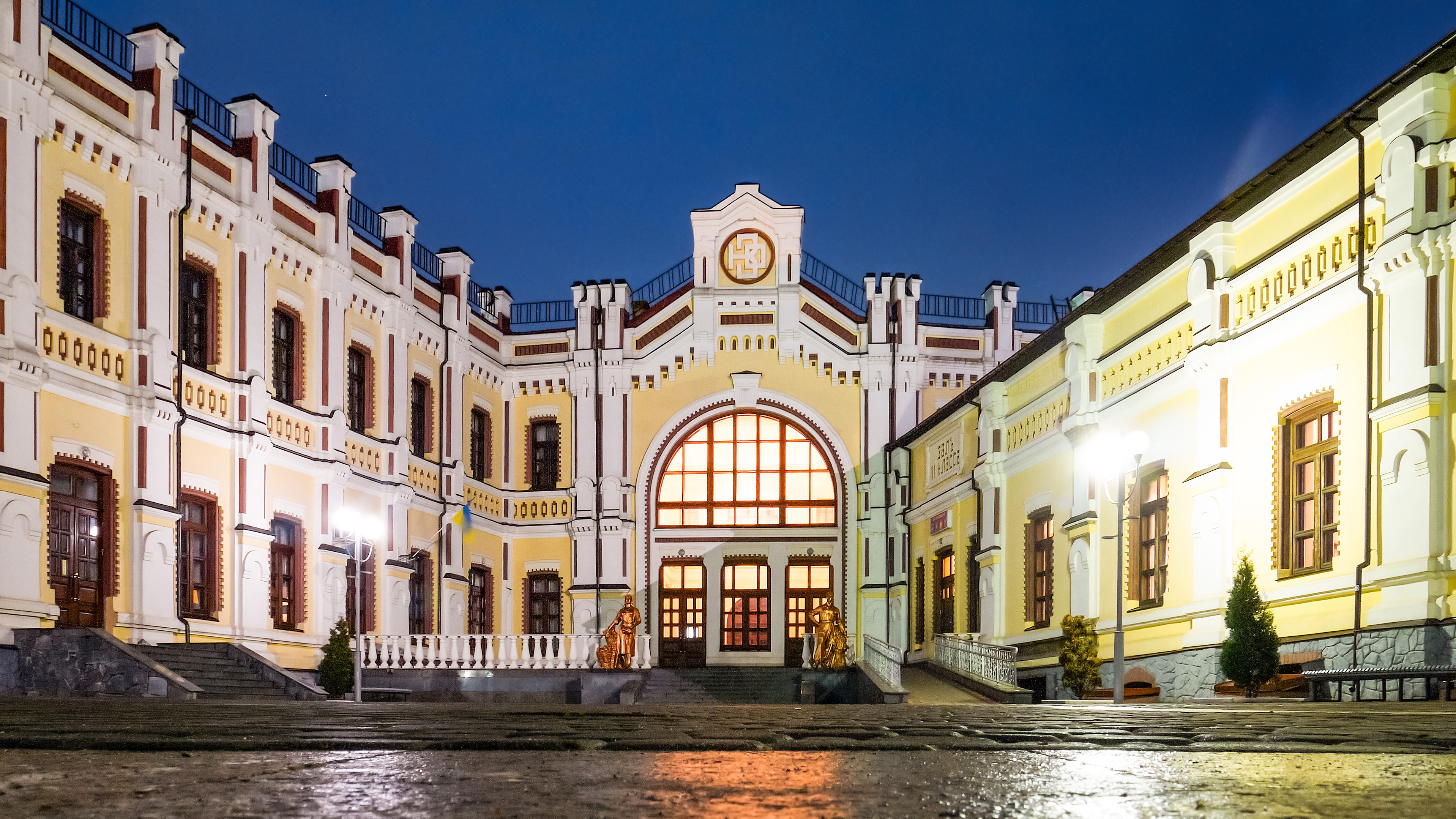 Залізничний вокзал, Козятин, вул. Вокзальна, 1